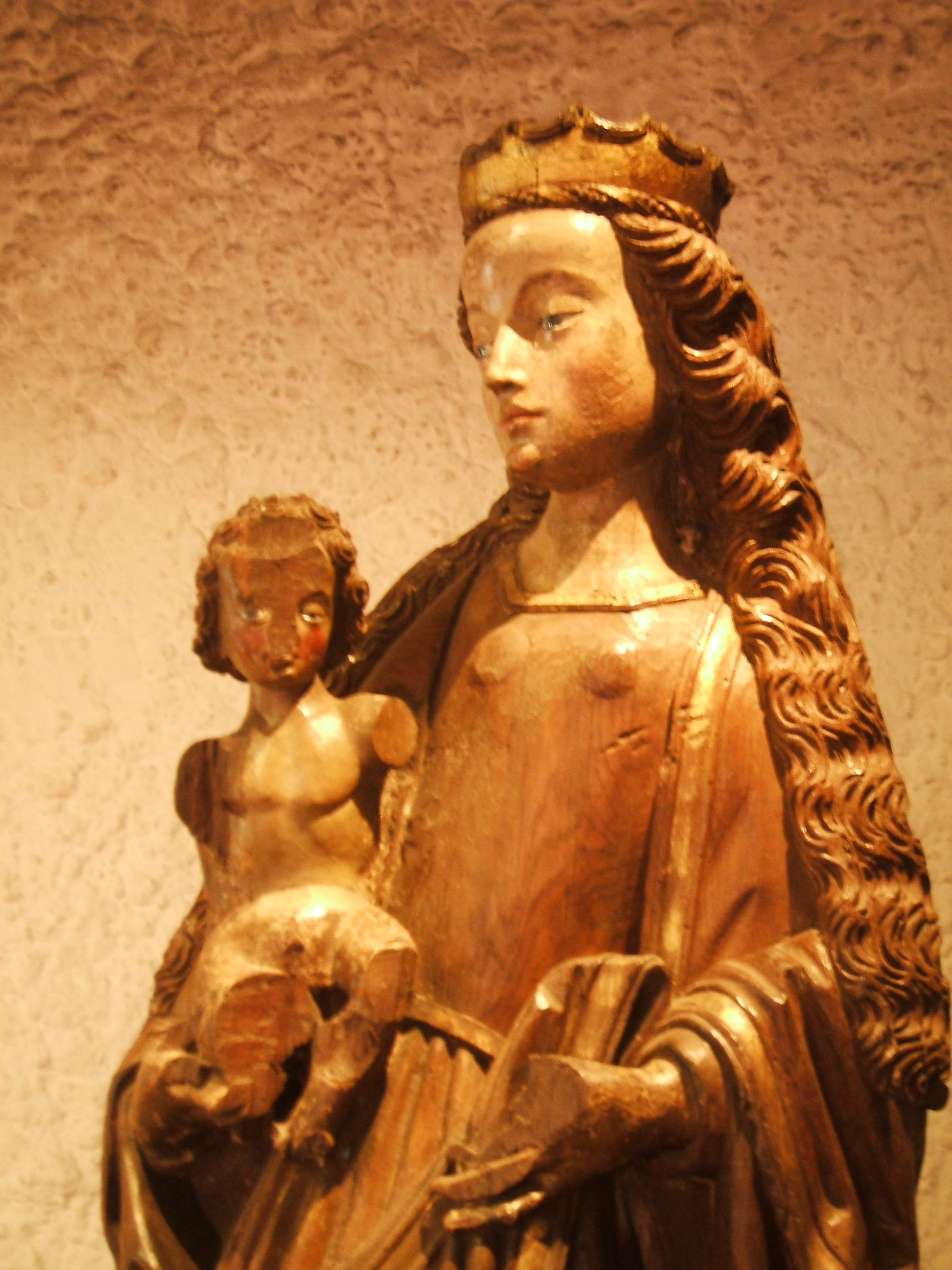 Marienfigur von 1360 in der Stralsunder katholischen Dreifaltigkeitskirche